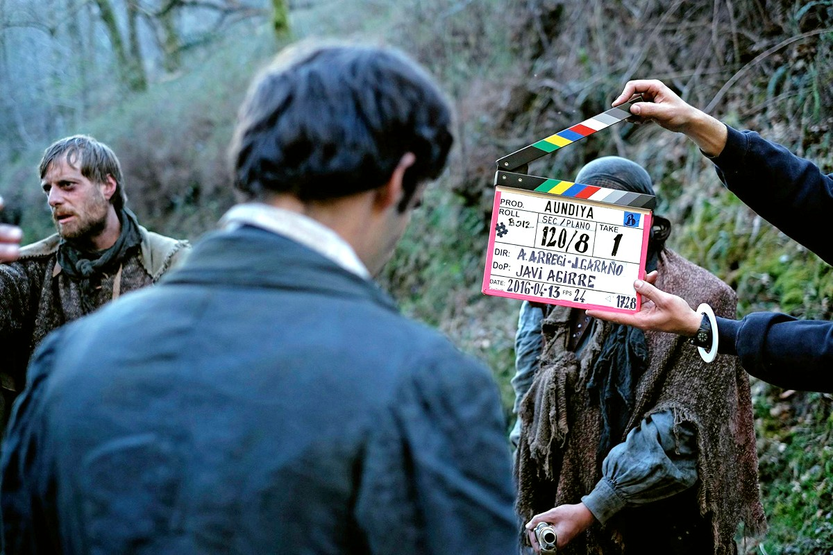 Handiaren filmaketaren zati bat. Hasieran filmaren izenburua Aundiya izateko asmoa zuten.